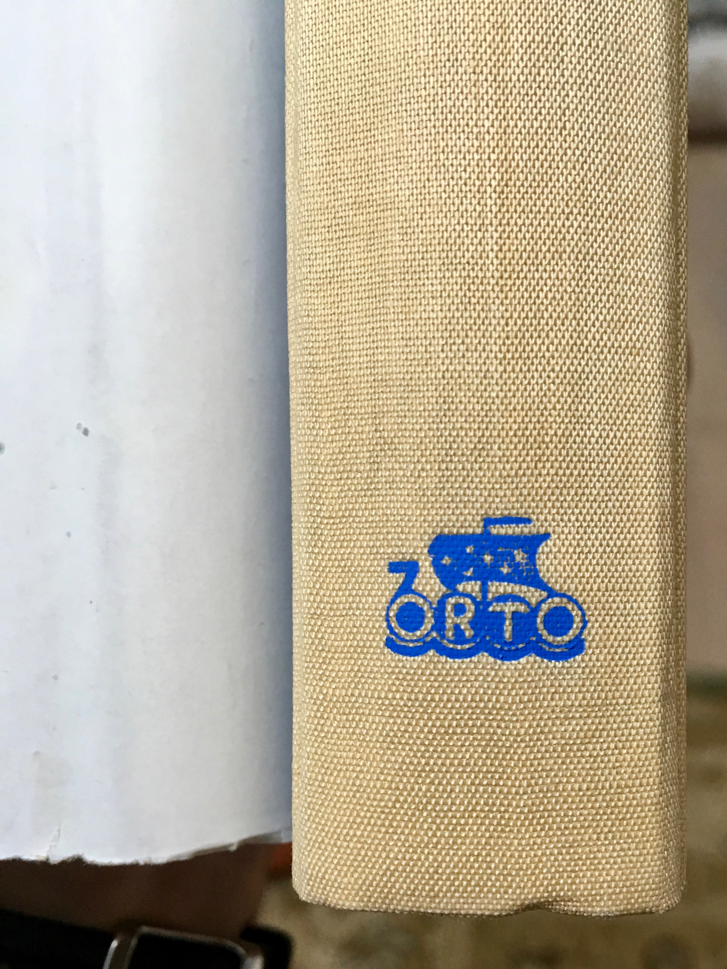 Orto logo raamatul